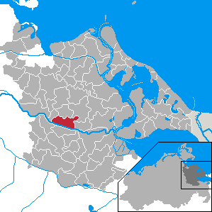 Groß Polzin, Landkreis Ostvorpommern, Mecklenburg-Vorpommern